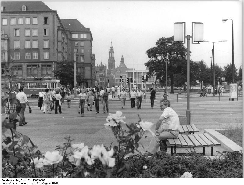 Dresden, Stadtzentrum ADN-ZB Zimmermann 23.8.79 Dresden: Blick von der Prager Straße- Ecke Dr. Wilhelm-Külz-Ring zum Altmarkt. In dieser Gegend Dresdens, die nach dem Krieg ein Trümmermeer war, herrscht stets ein lebhafter Publikumsverkehr. Der Altmarkt und die Prager Straße sind Einkaufszentren. (siehe dazu zur Gegenüberstellung 22N)